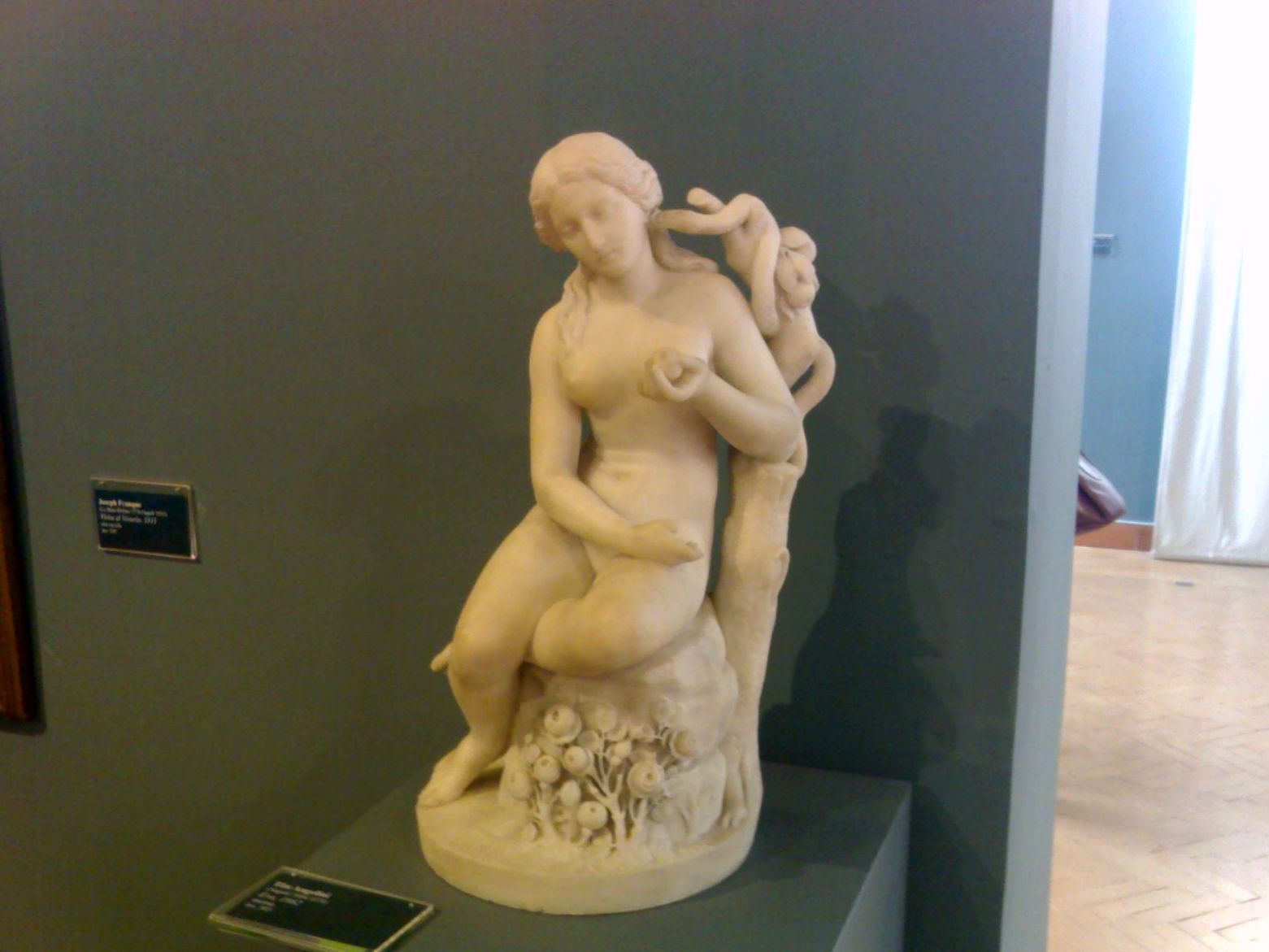 Accademia di Belle Arti di Napoli - La galleria dell'accademia, Tito Angelini Eva (1862, marmo)